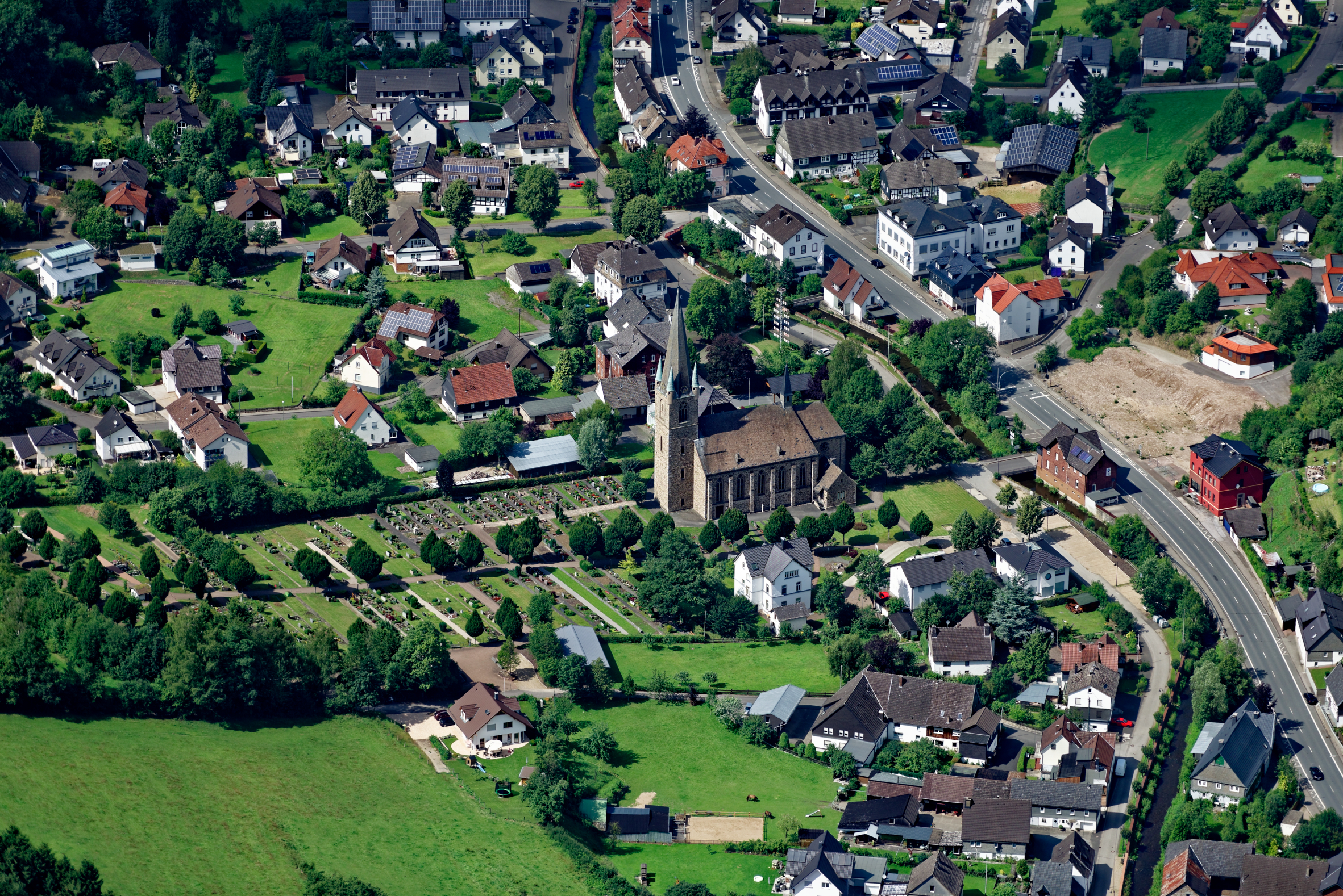 Luftaufnahme: Teil von Lennestadt-Grevenbrück mit Kirche St. Nikolaus, Nordrhein-Westfalen.